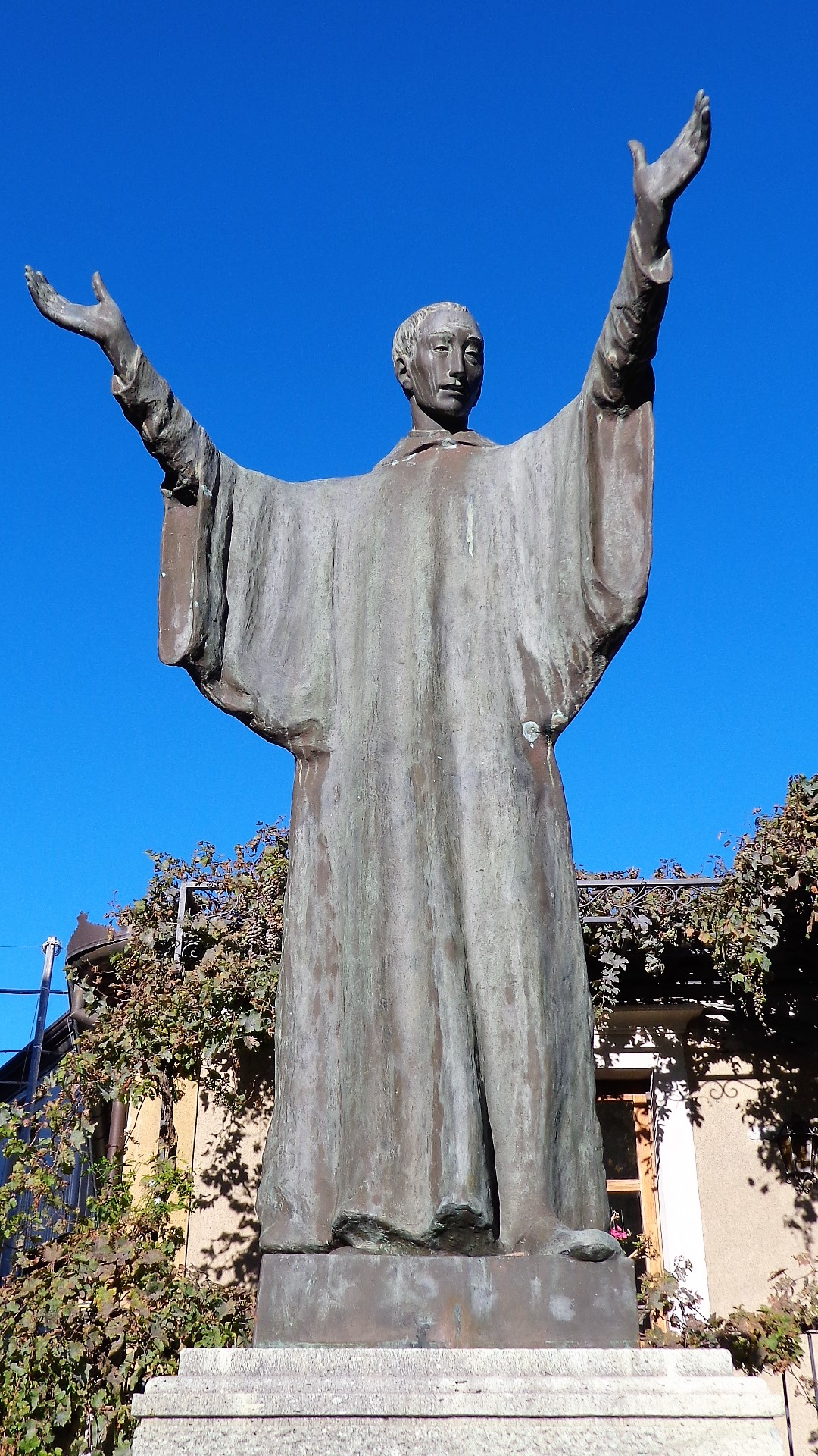 Sant'Ugo Abate Cistercense, monumento di Novara di Sicilia, dettaglio.